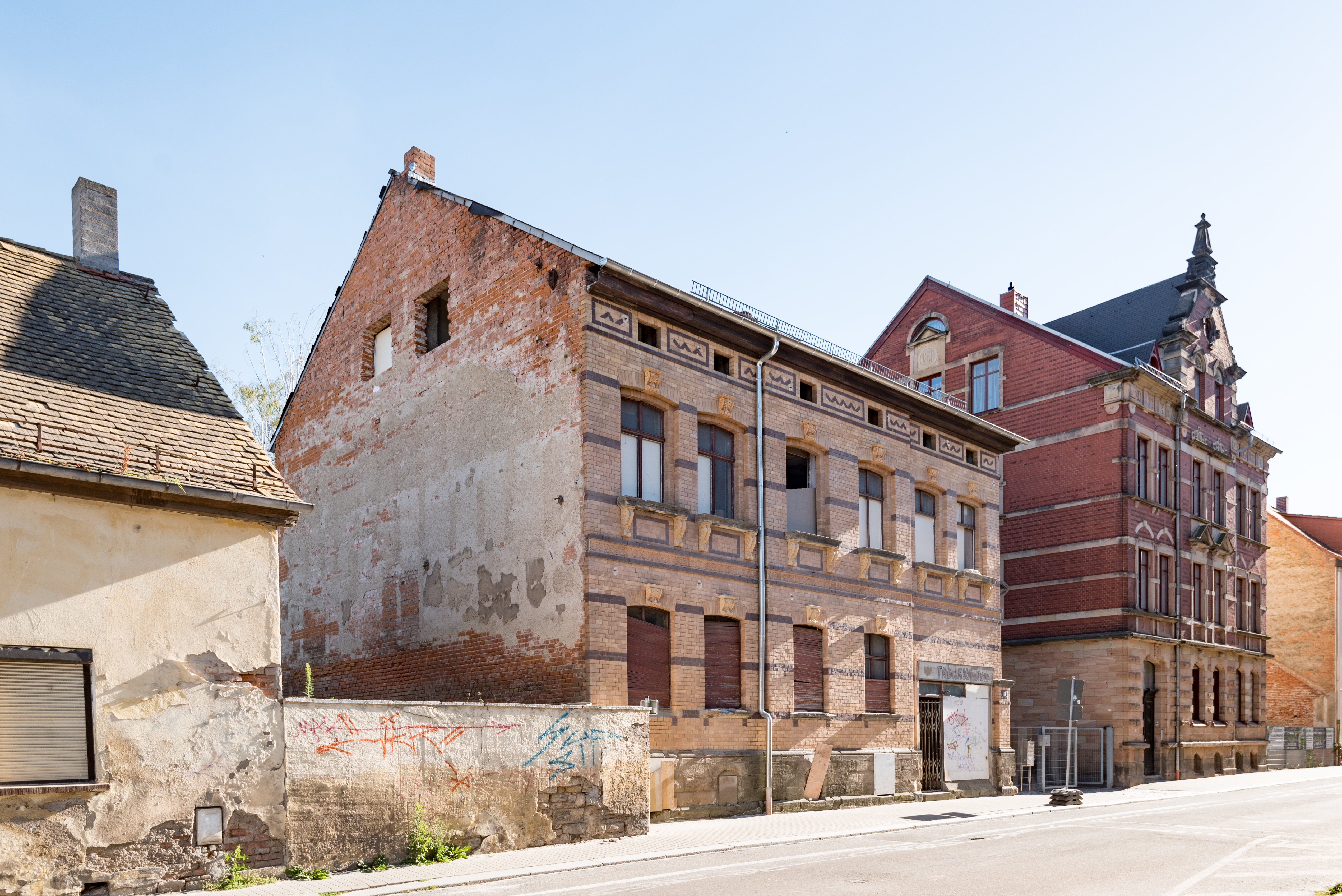 Weißenfels, Beuditzstraße 20